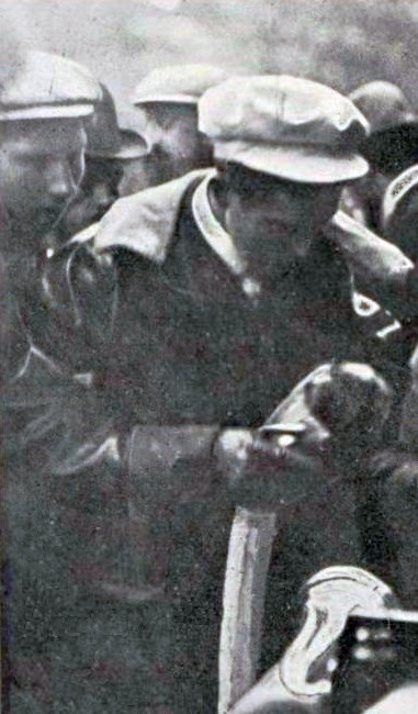 Le comte Boson de Perigord réparant un pneumatique lors de Paris-Berlin 1901 - Le Sport universel illustré du 6 juillet 1901, p.431